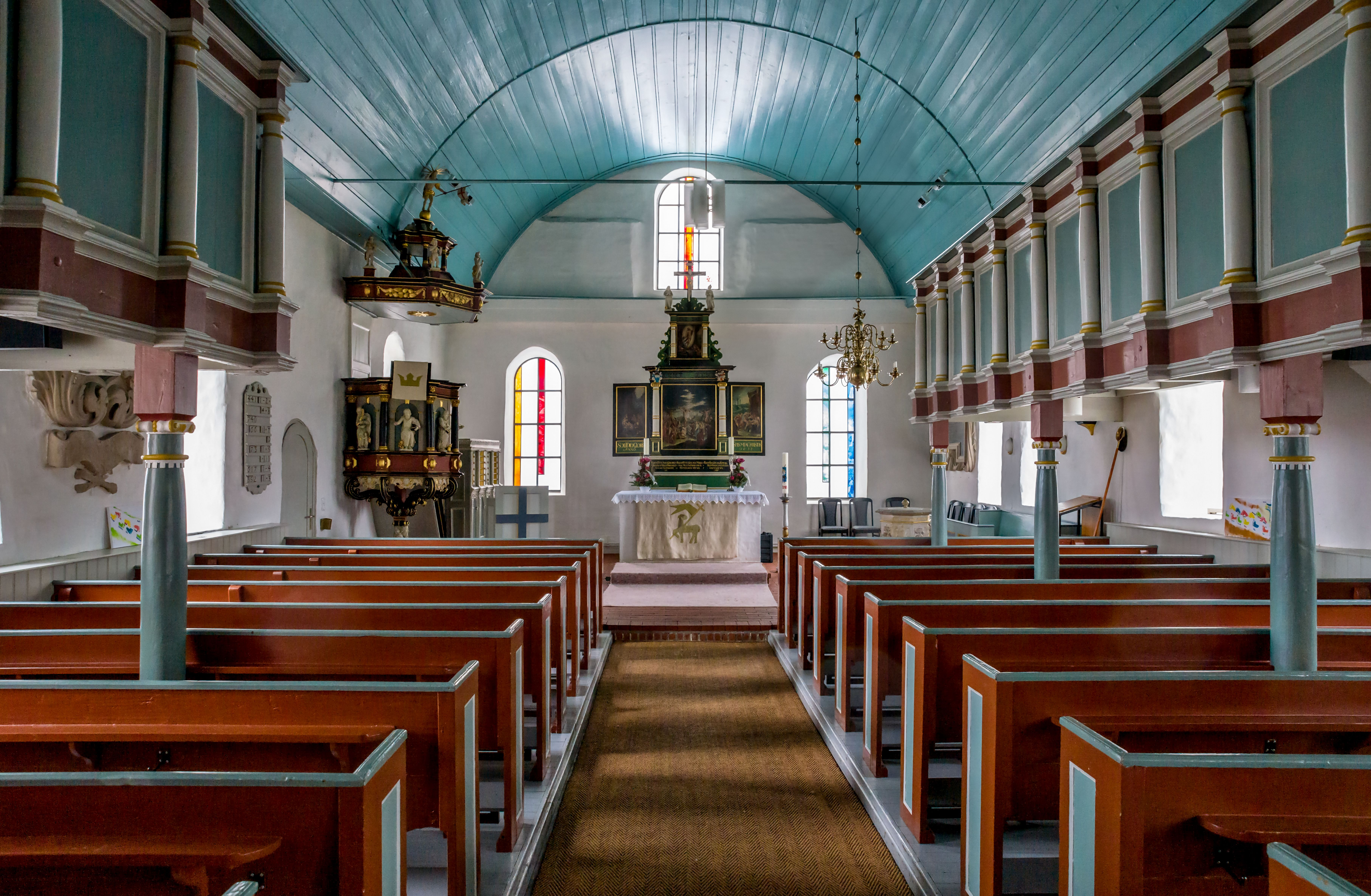 St. Marienkirche von 1384 in Hechthausen, Niedersachsen, Deutschland